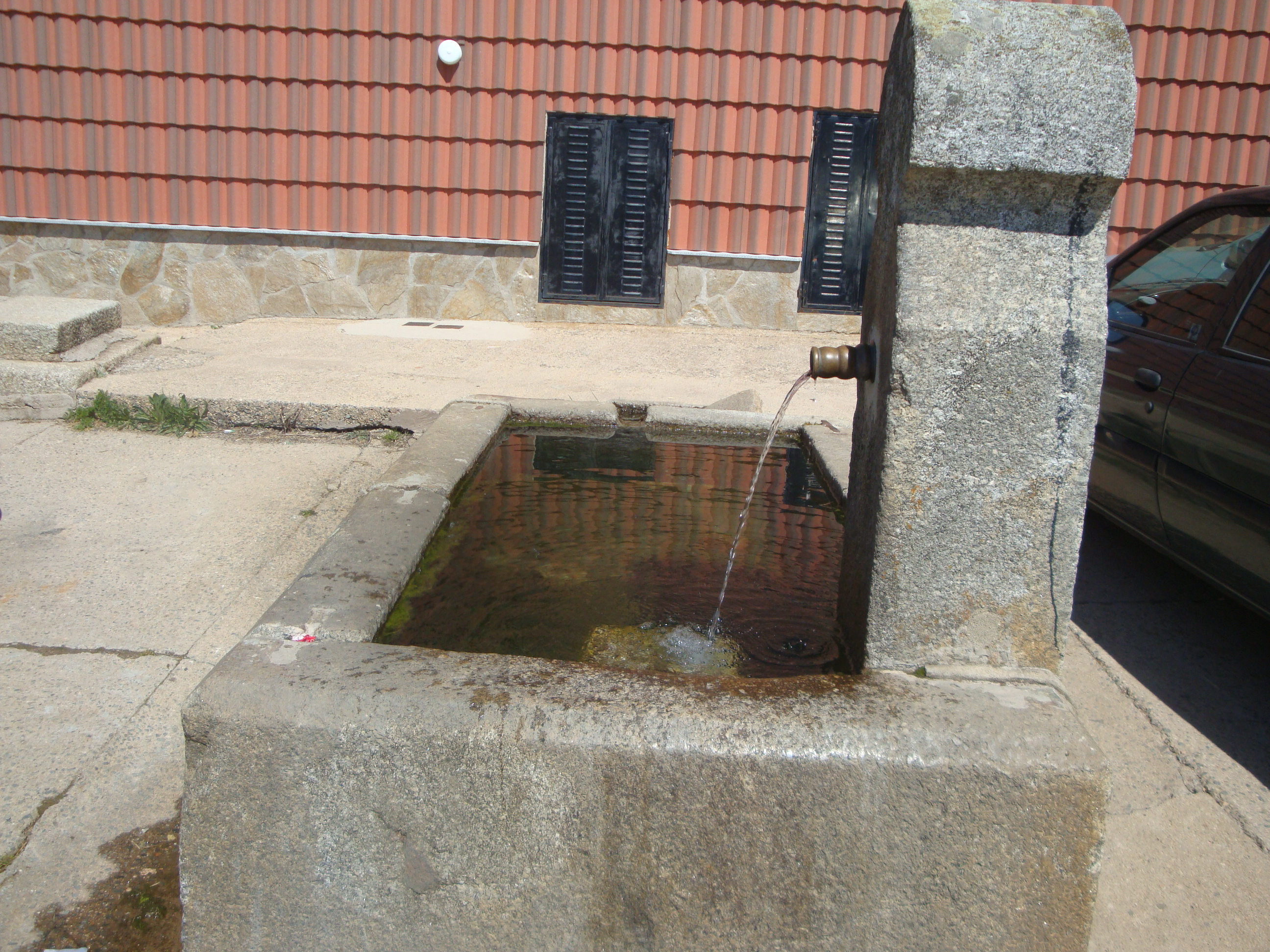 Fuente con bebedero para vacas y caballerías conocido como "Pilón". Puerto Castilla (Ávila)